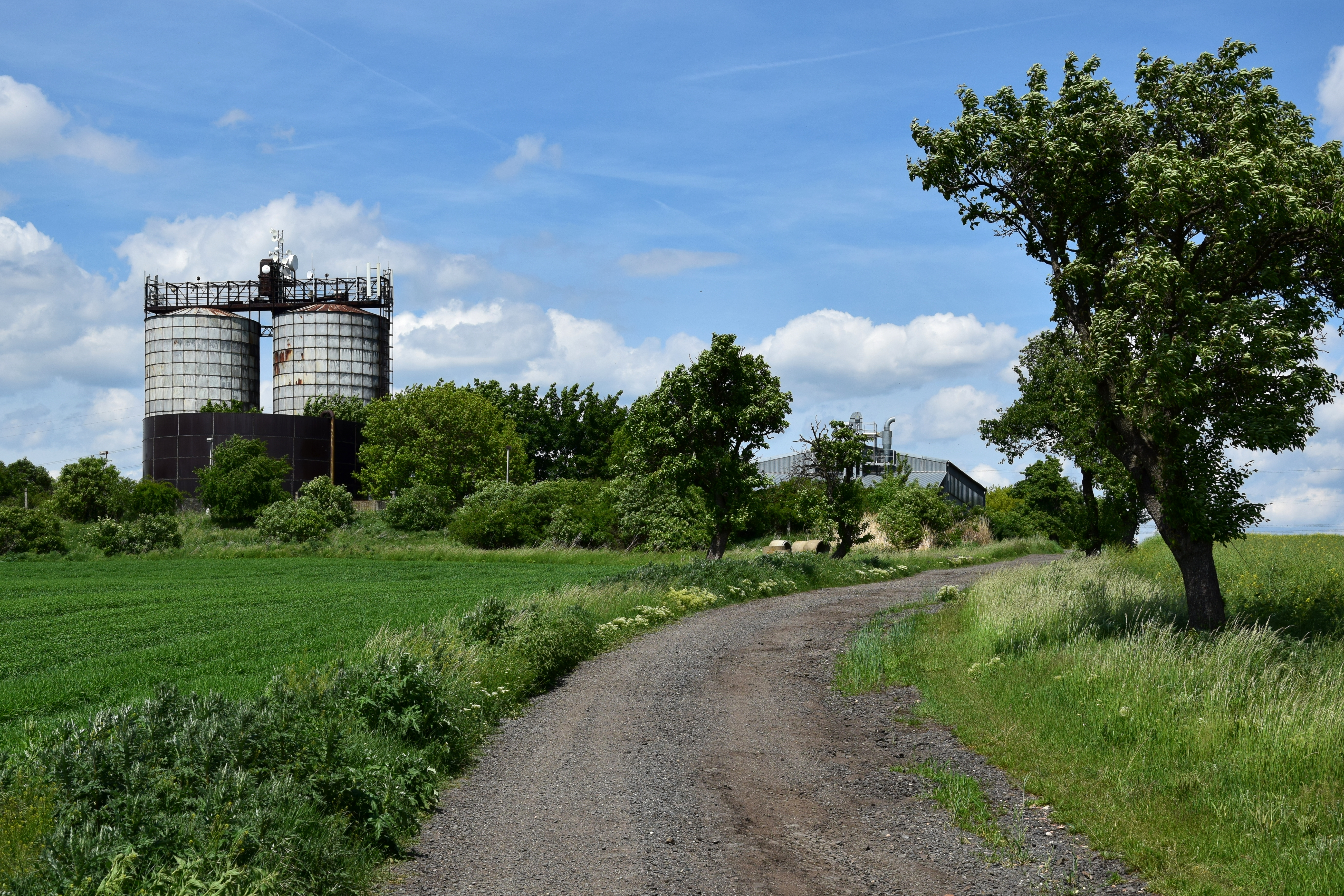 Poláky – zemědělský areál jižně od vesnice u cesty do Pětipes